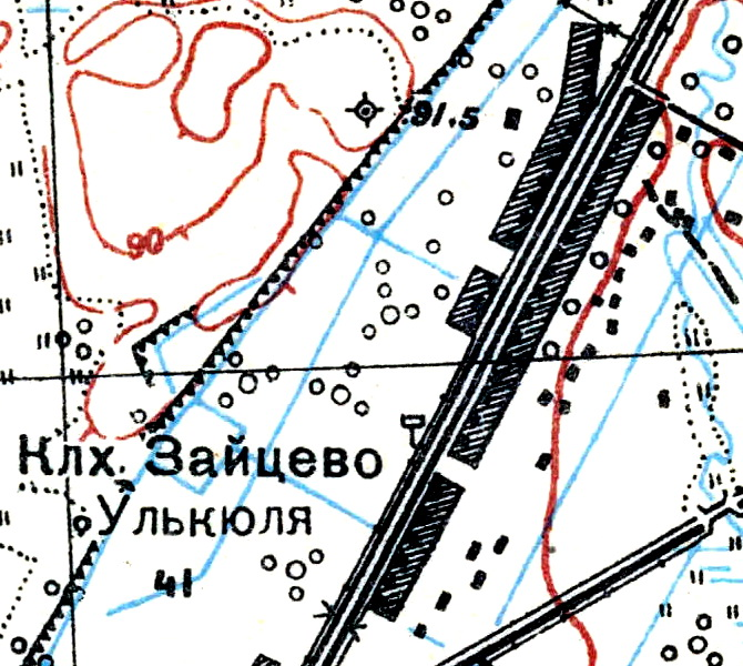 Топографическая карта Ленинградской области, квадрат О-36-13-А-б (Пос. Тайцы), деревня Зайцево